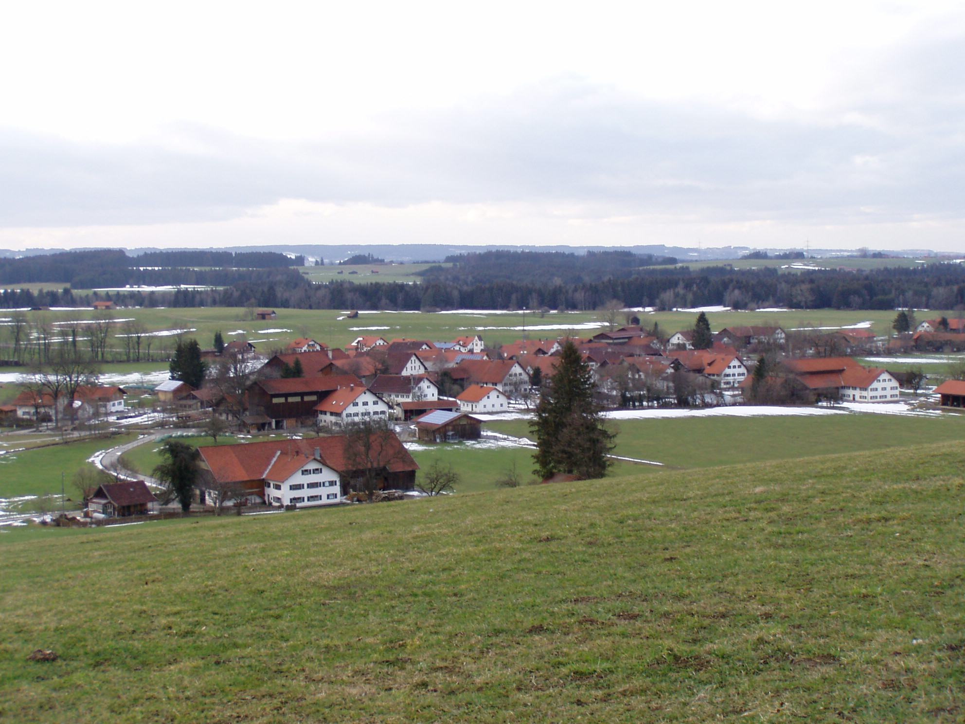 Ob, Bidingen